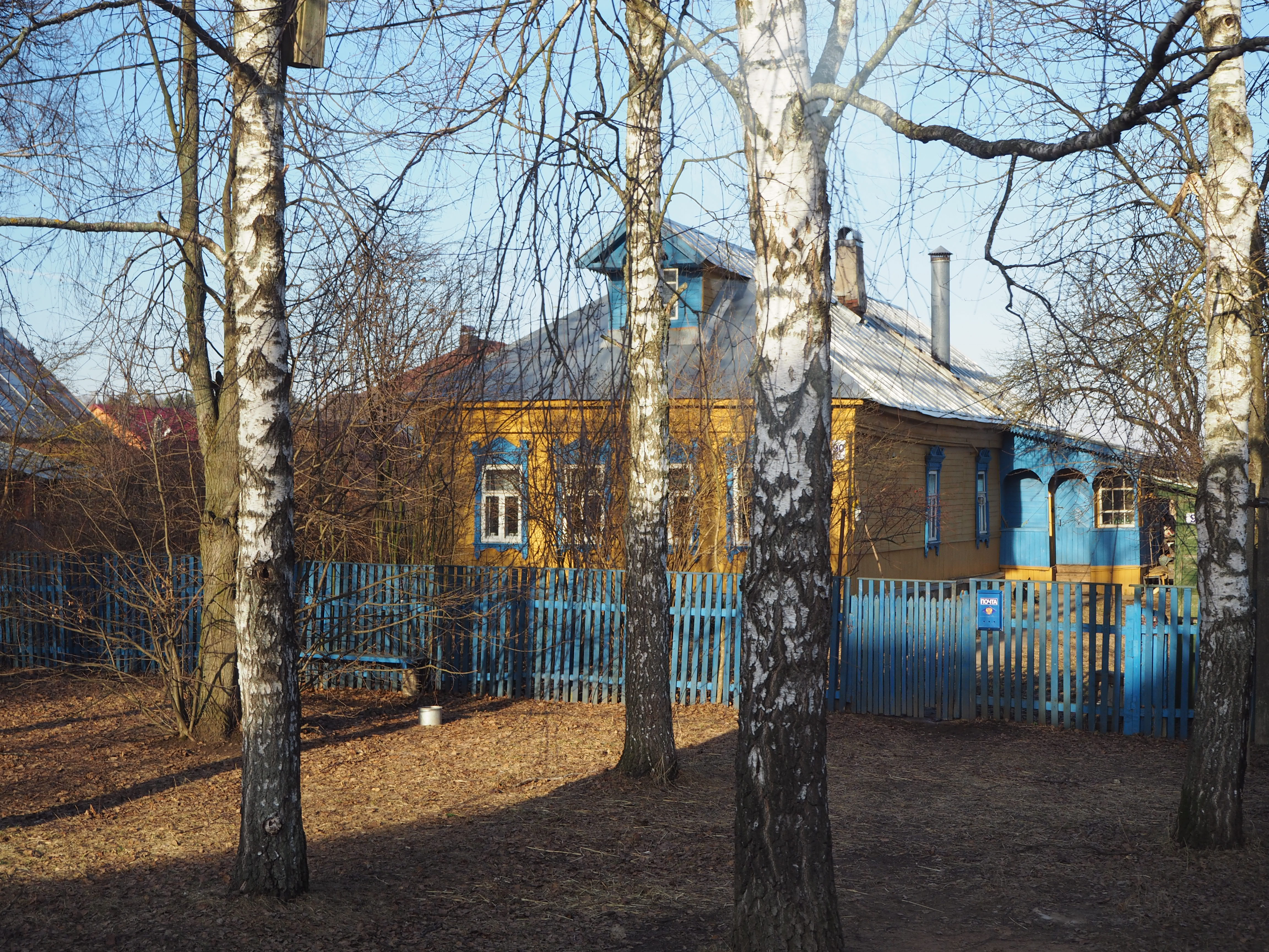 Викиэкспедиция в Звенигородскую обсерваторию.